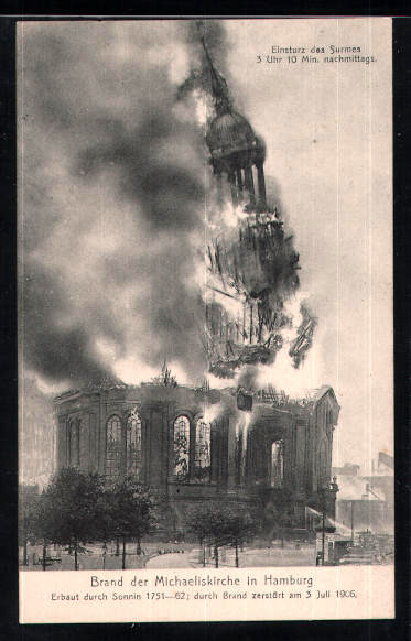 Brand der Michaeliskirche in Hamburg 1906, Einsturz des Turmes